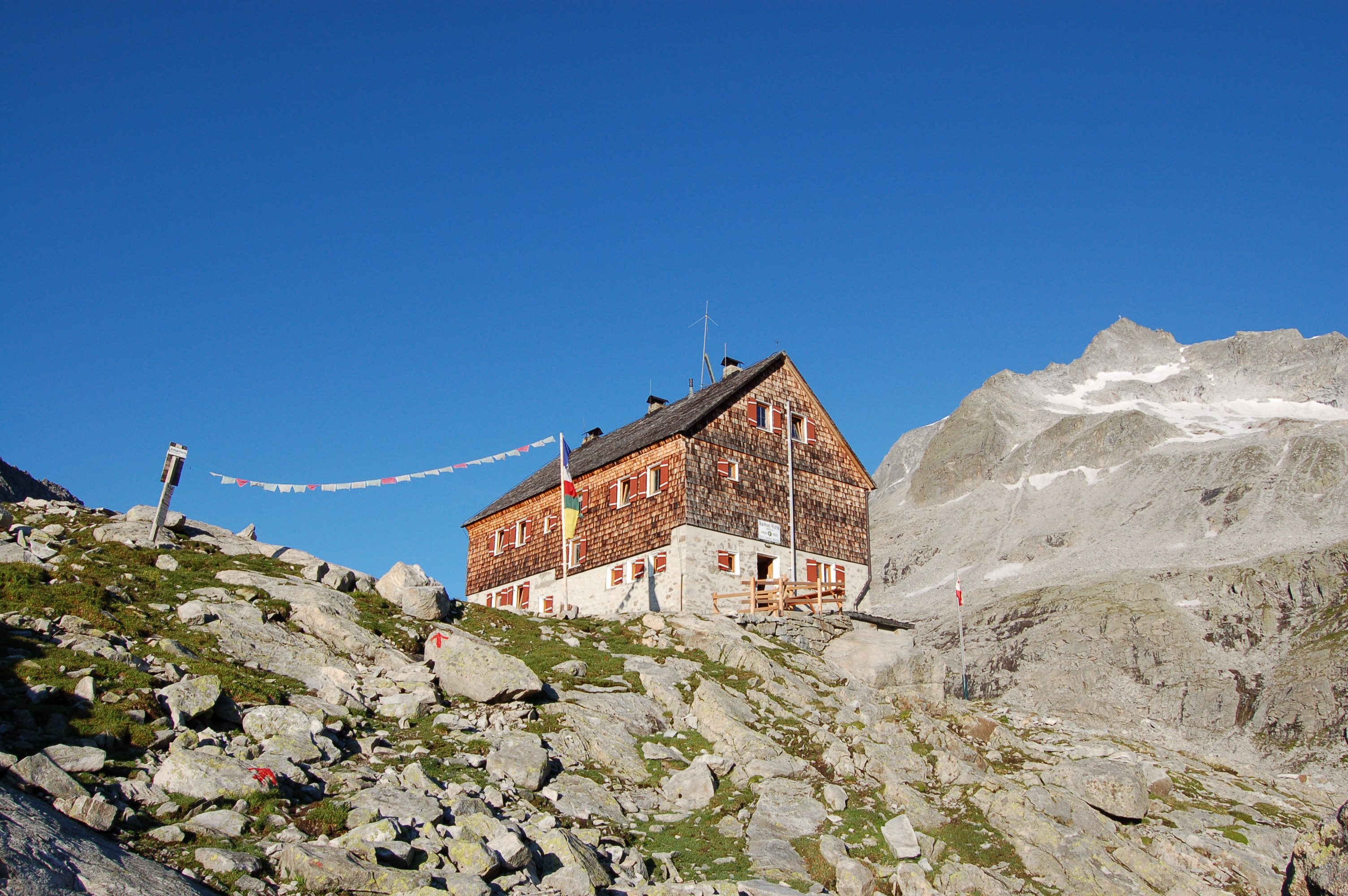 Die Barmerhütte mit der Barmer Spitze im Hintergrund